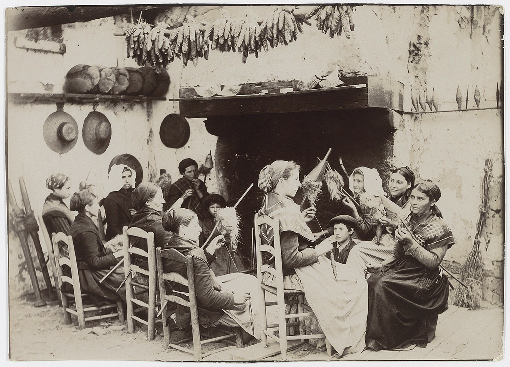 Reproduction numérique d'une épreuve photographique de Félix Arnaudin, matière: papier photographique, technique: positif (tirage argentique)